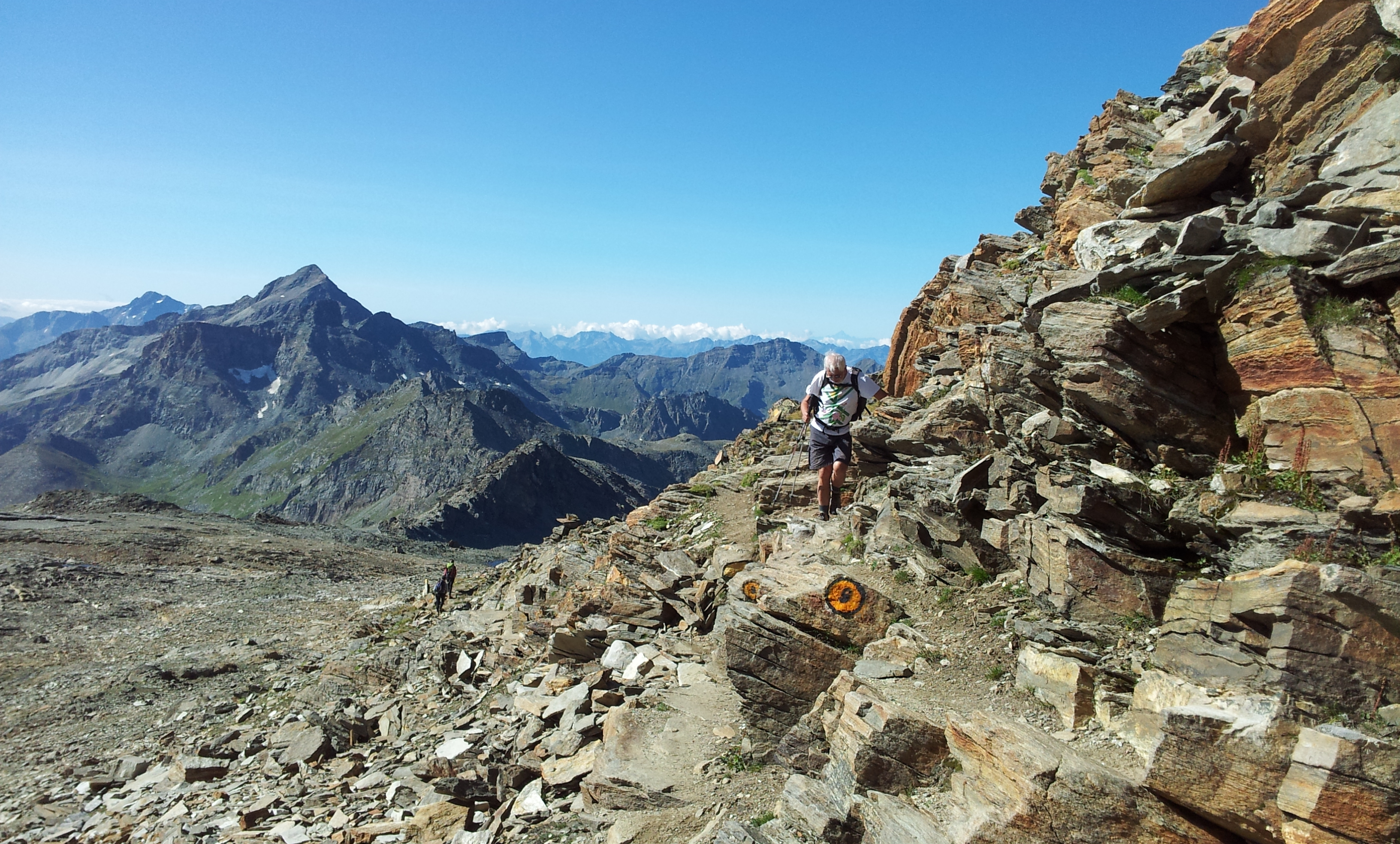 Salendo al rifugio Quintino Sella.